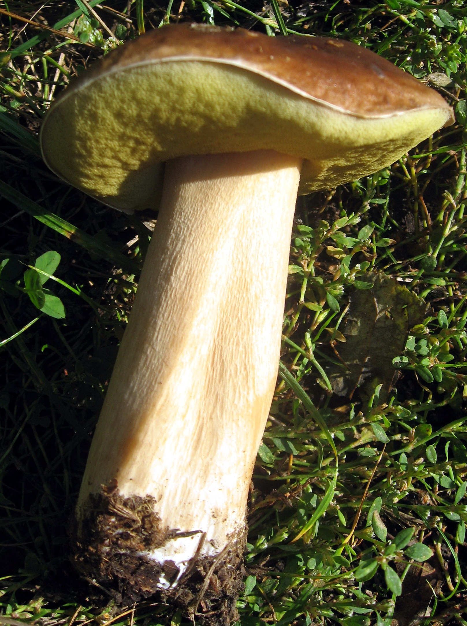 Hřib dubový ???